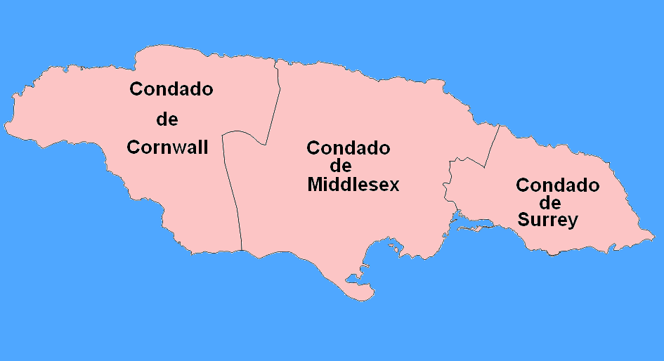 Mapa detallando los tres condados que conforman parte de la subdivisión territorial de Jamaica.